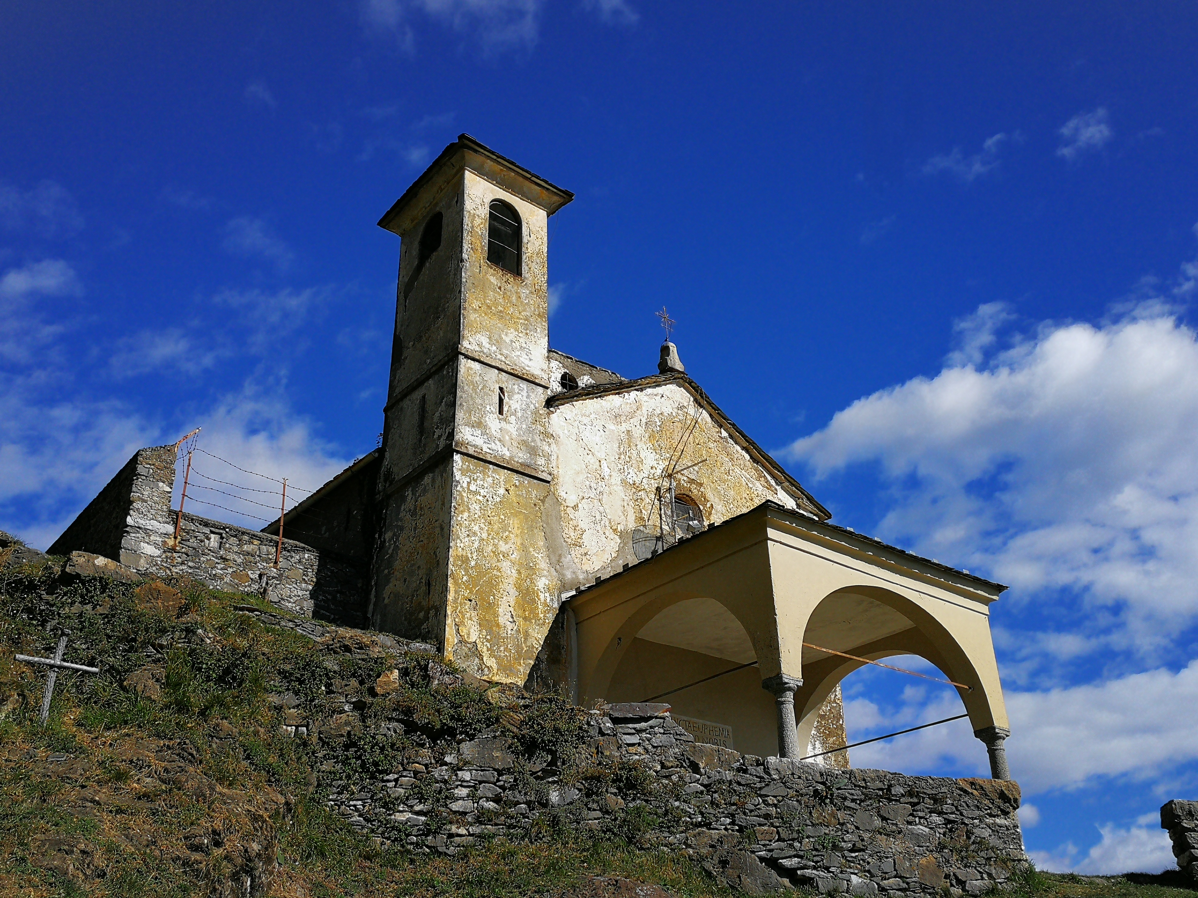 Vista esterna chiesetta di Sant' Eufemia